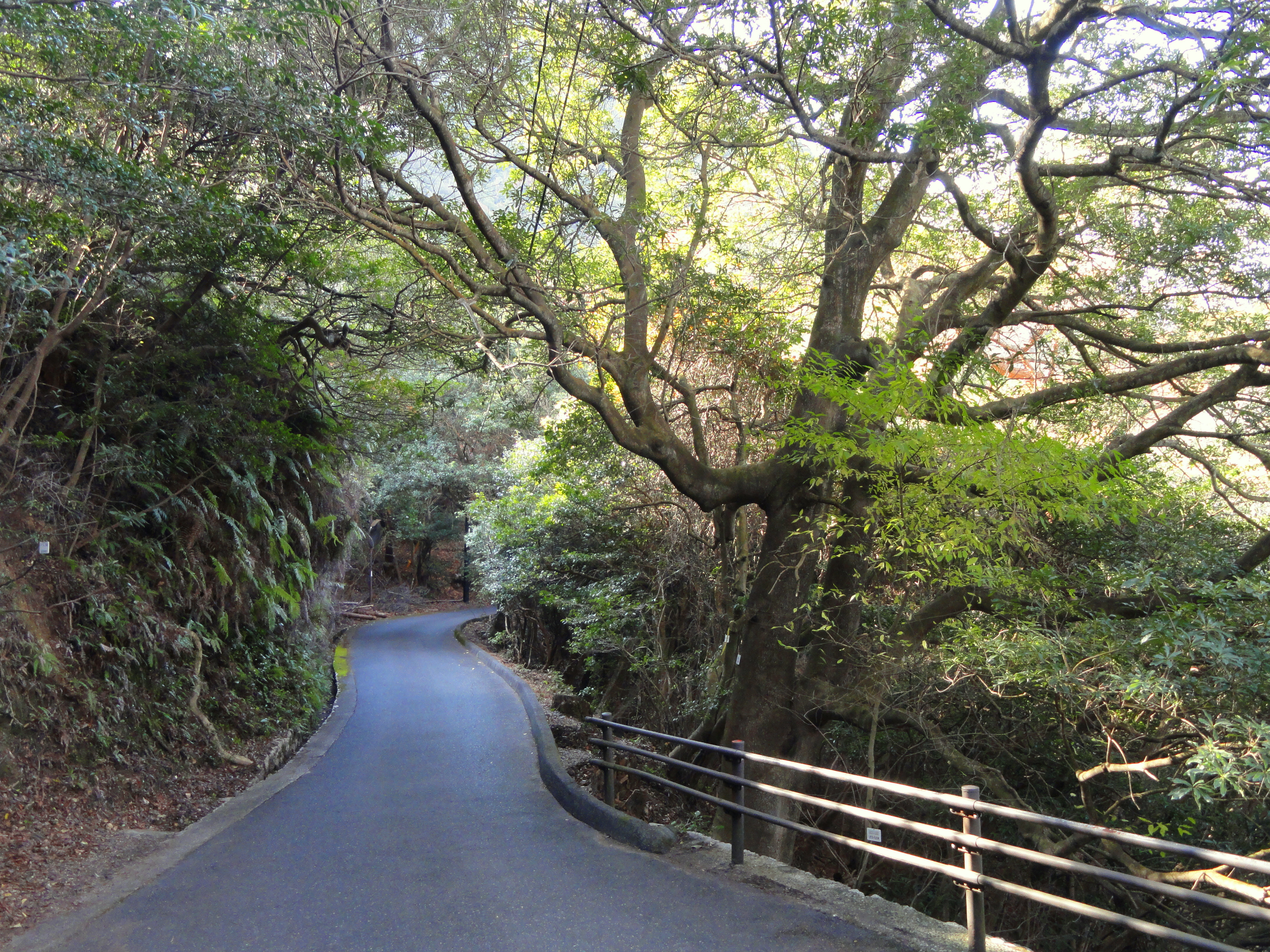 Miyajima Natural Botanical Garden, Hatsukaichi, Hiroshima, Japan.